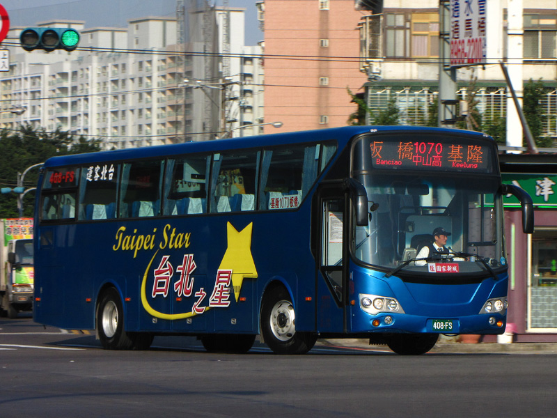 臺北客運日野RN8JSSA大客車408-FS，行駛1070線。